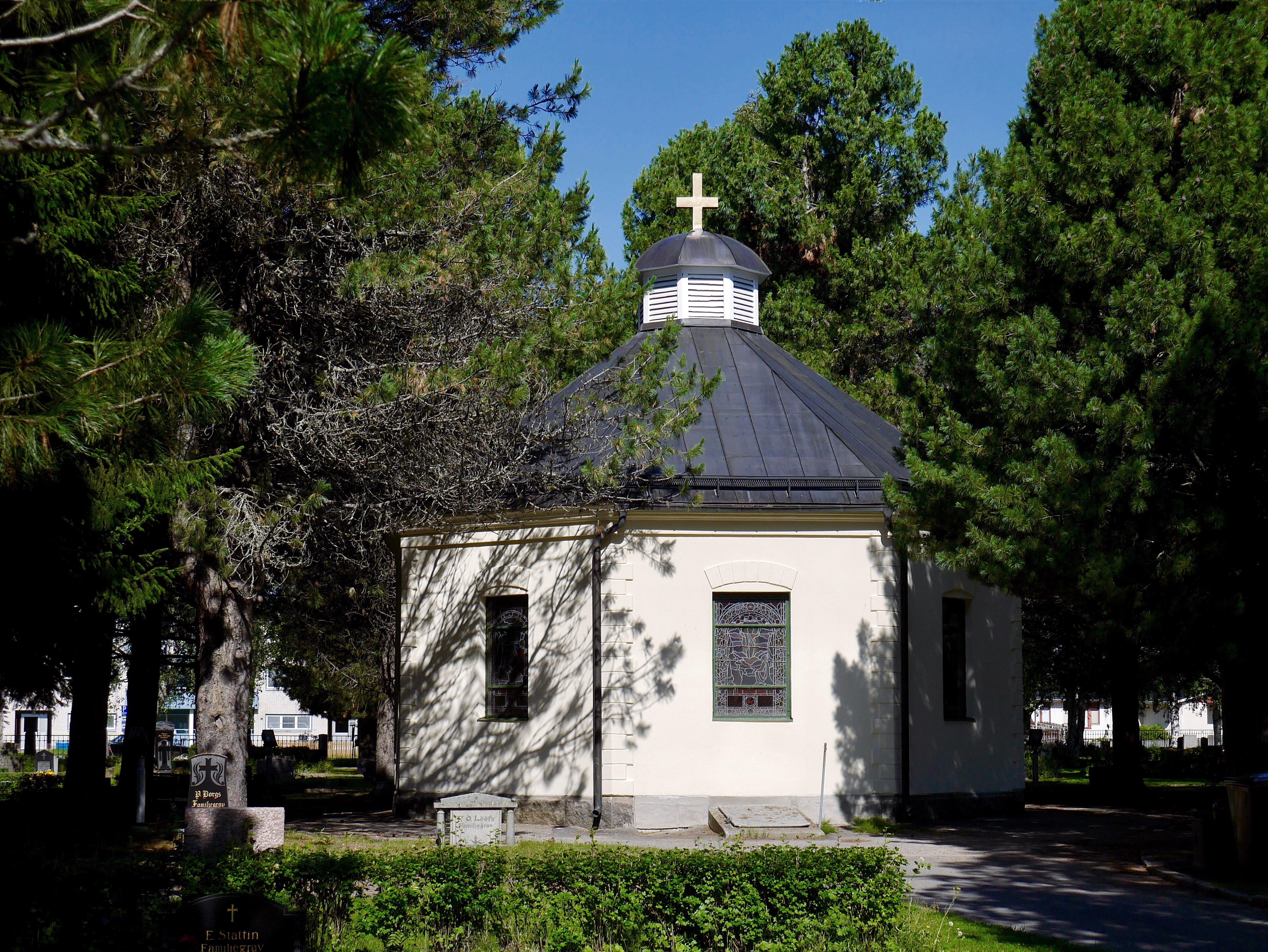 Lundagårds kapell är en kyrkobyggnad uppförd år 1913, som tillhör Överluleå församling i Luleå stift. Bild tagen sommaren 2016.